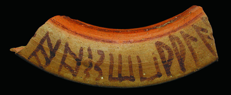 El signario del Castellet de Bernabé, pintado sobre el borde de una tinajilla de cerámica ibércia pintada (circa 200 a.C.)